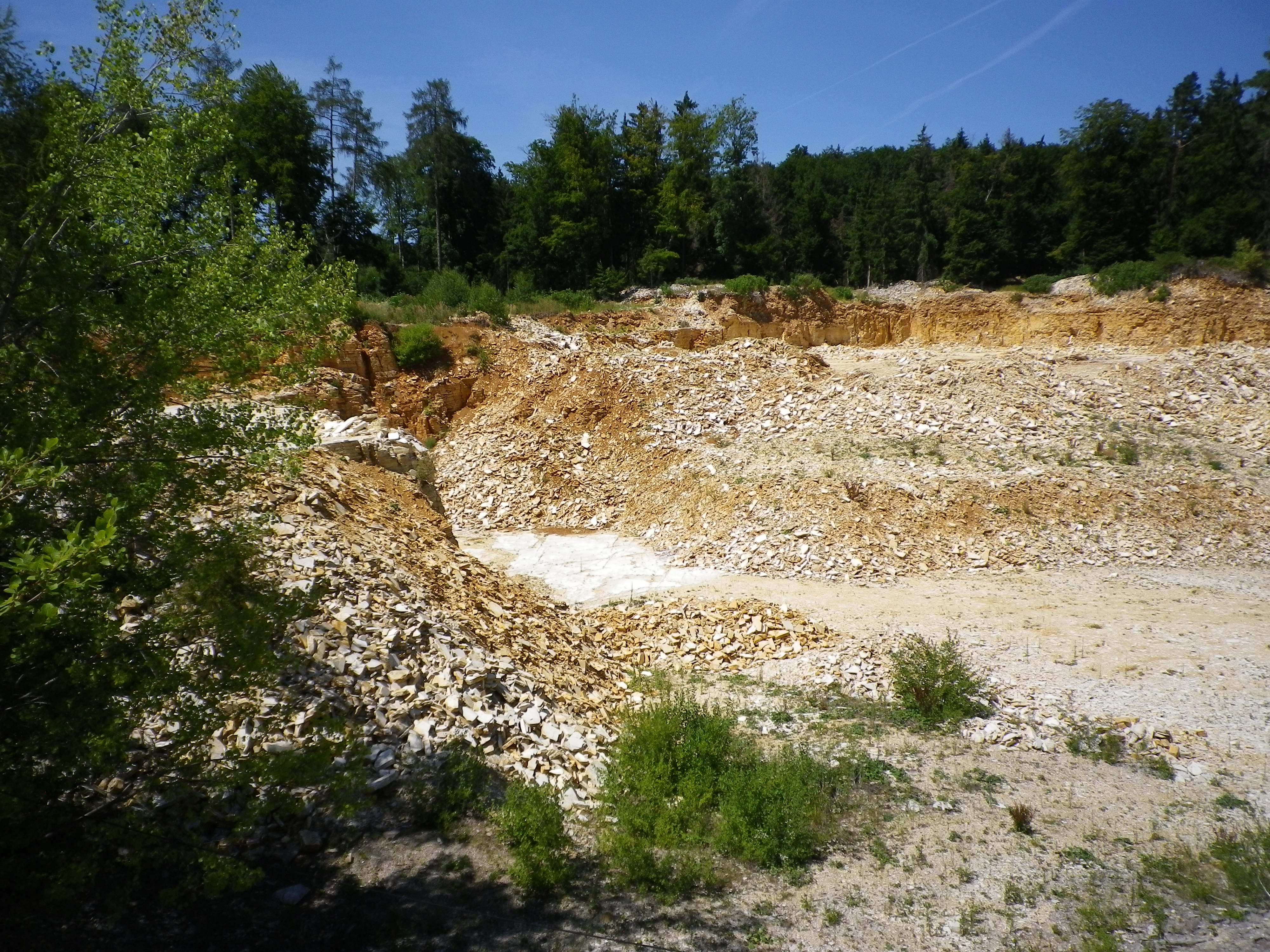 Kalkschieferbruch von Zandt